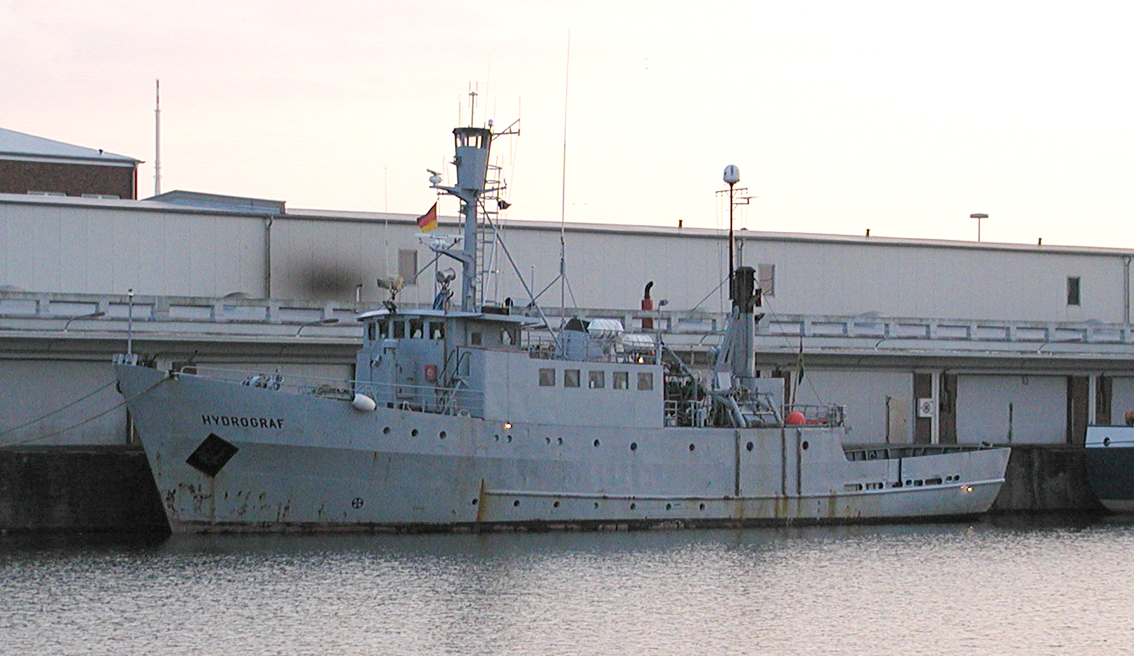 Die M/V Hydrograf ehemals KV Nysleppen aus Norwegen